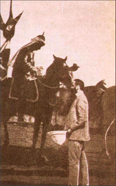 התמונה "המתוקנת" בפוטומונטז' של הרצל